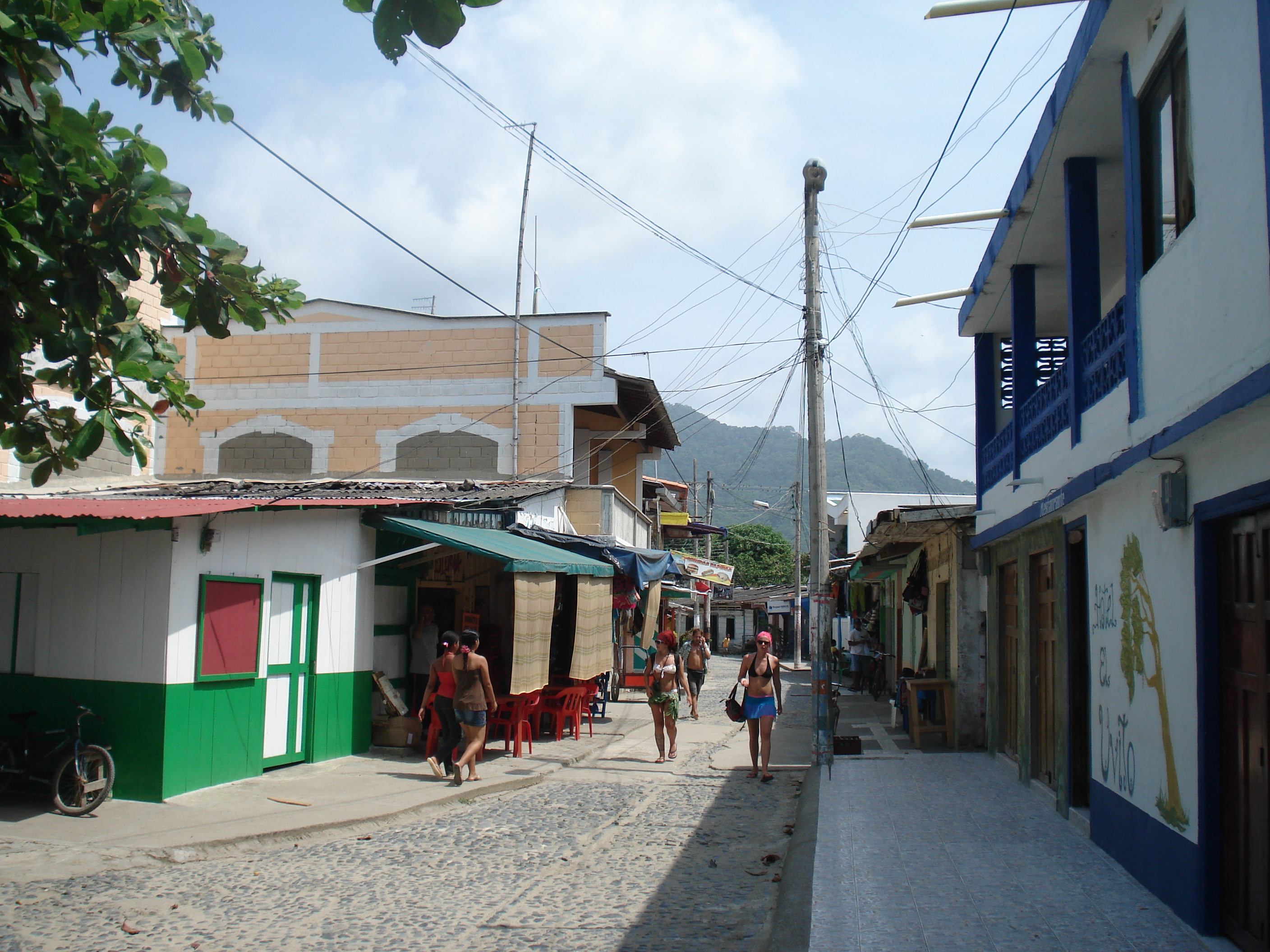 Capurganá